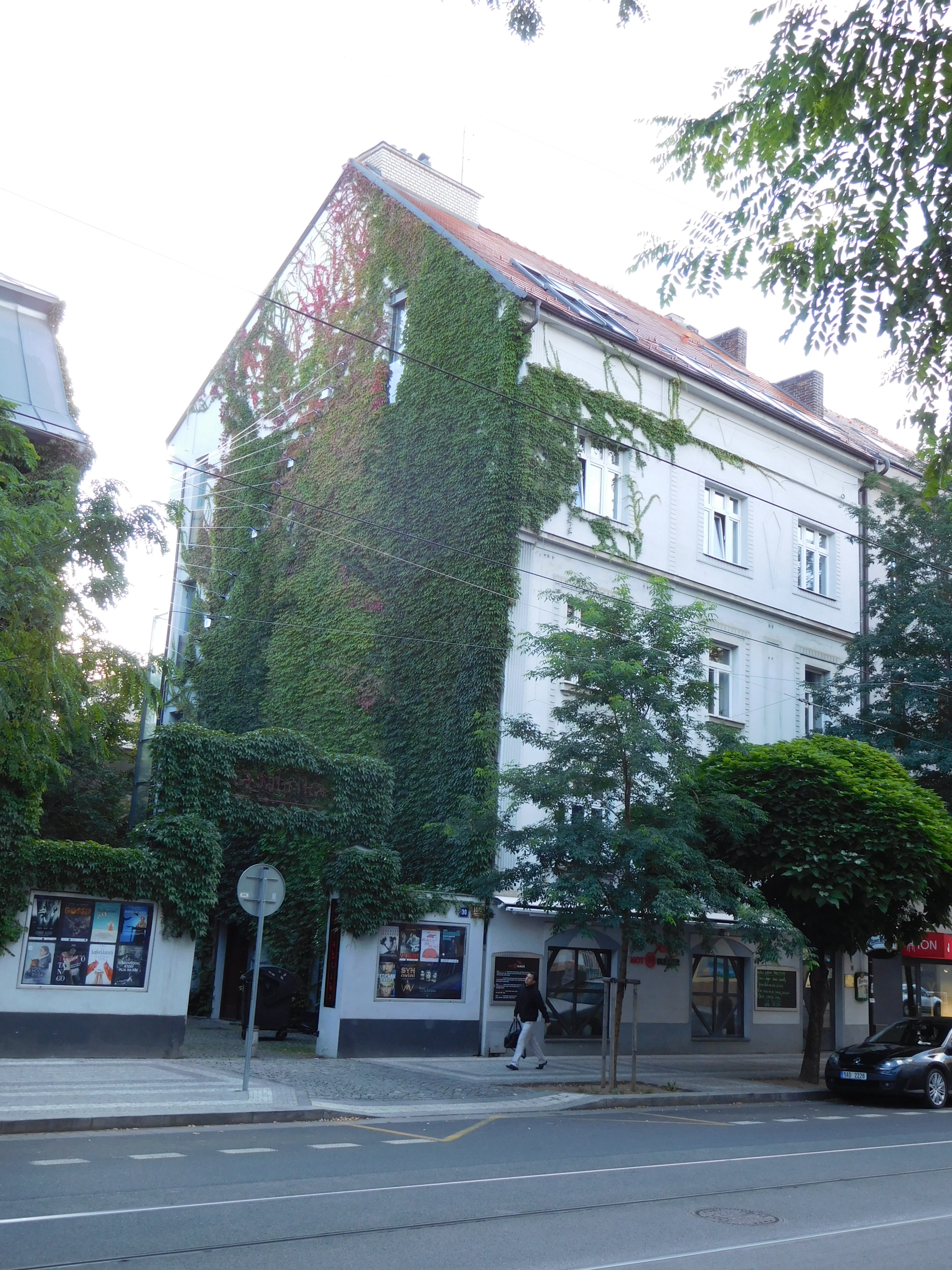 Praha - Holešovice, Komunardů 30; Divadlo La Fabrika